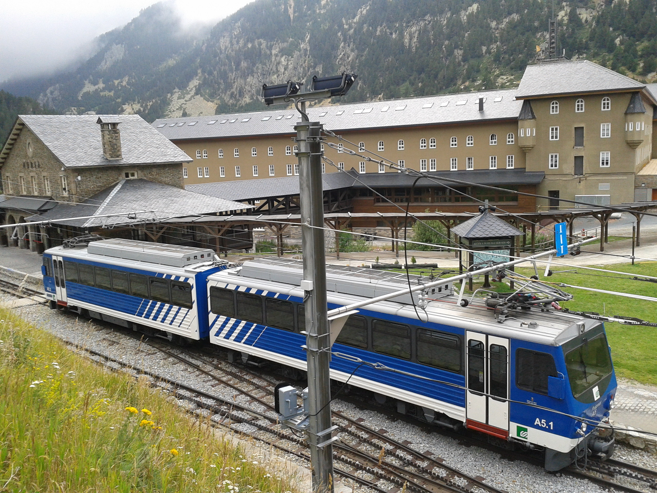 Estació de Núria i Santuari amb el cremallera en primer terme